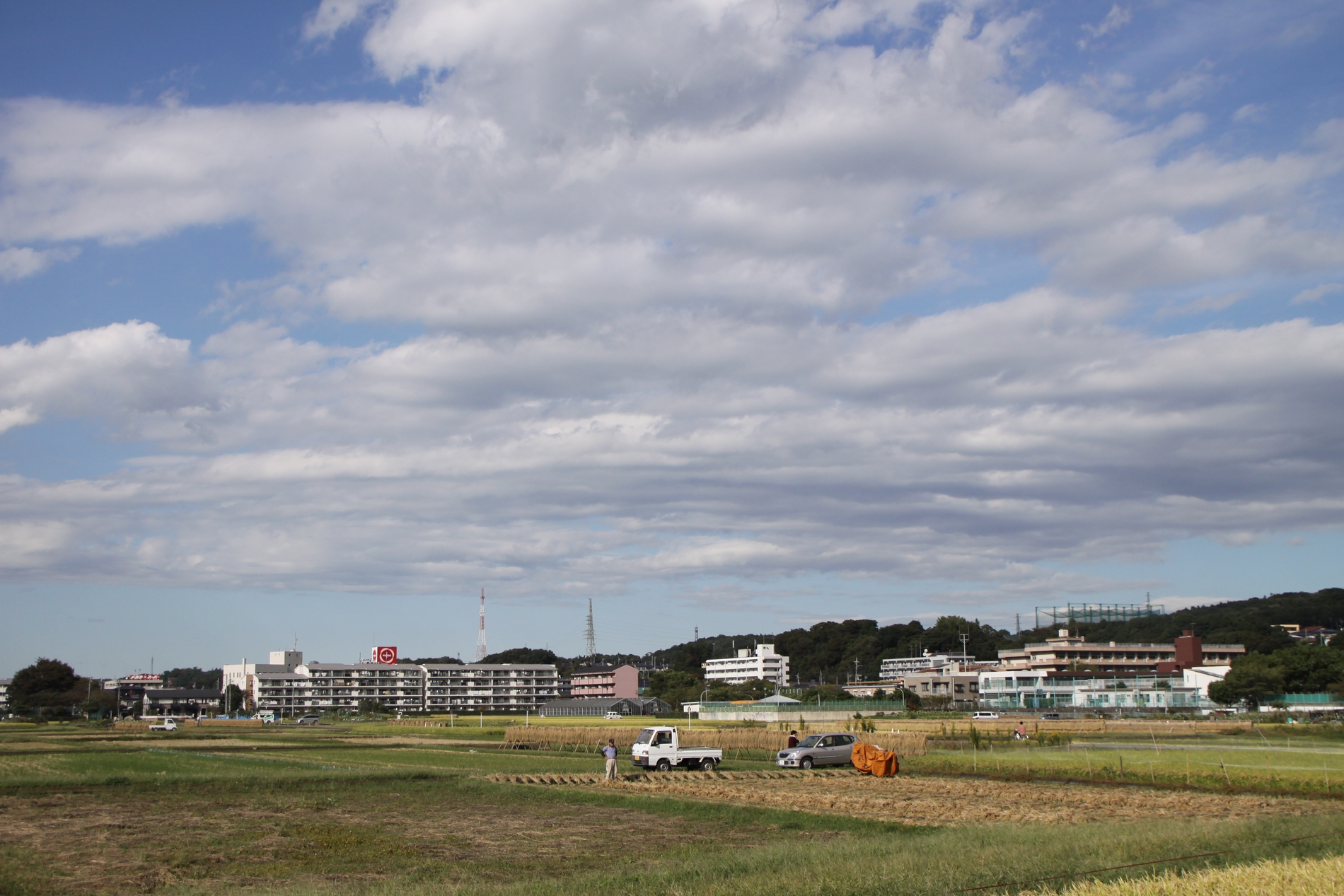 秋の入谷駅周辺の風景。